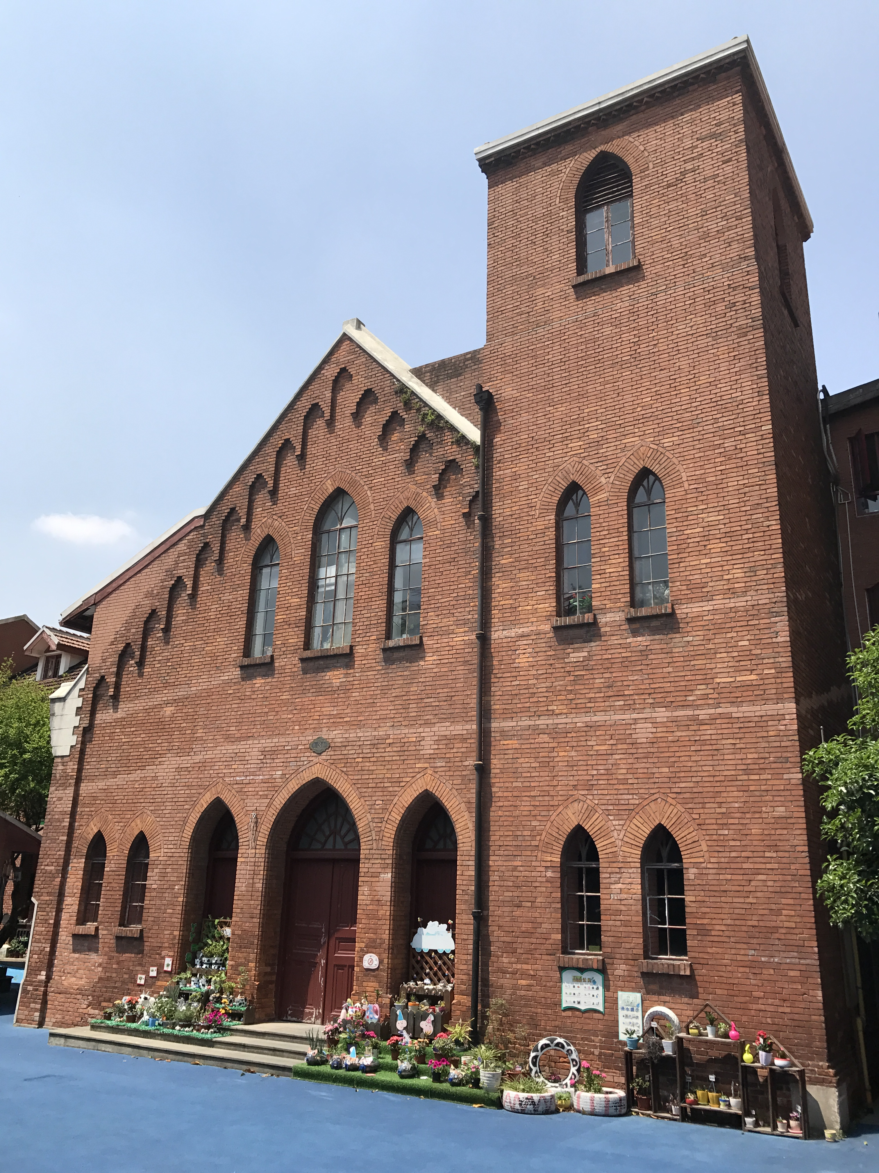 中文（中国大陆）: 天恩堂旧址 松雪街78号（松雪街幼儿园内）